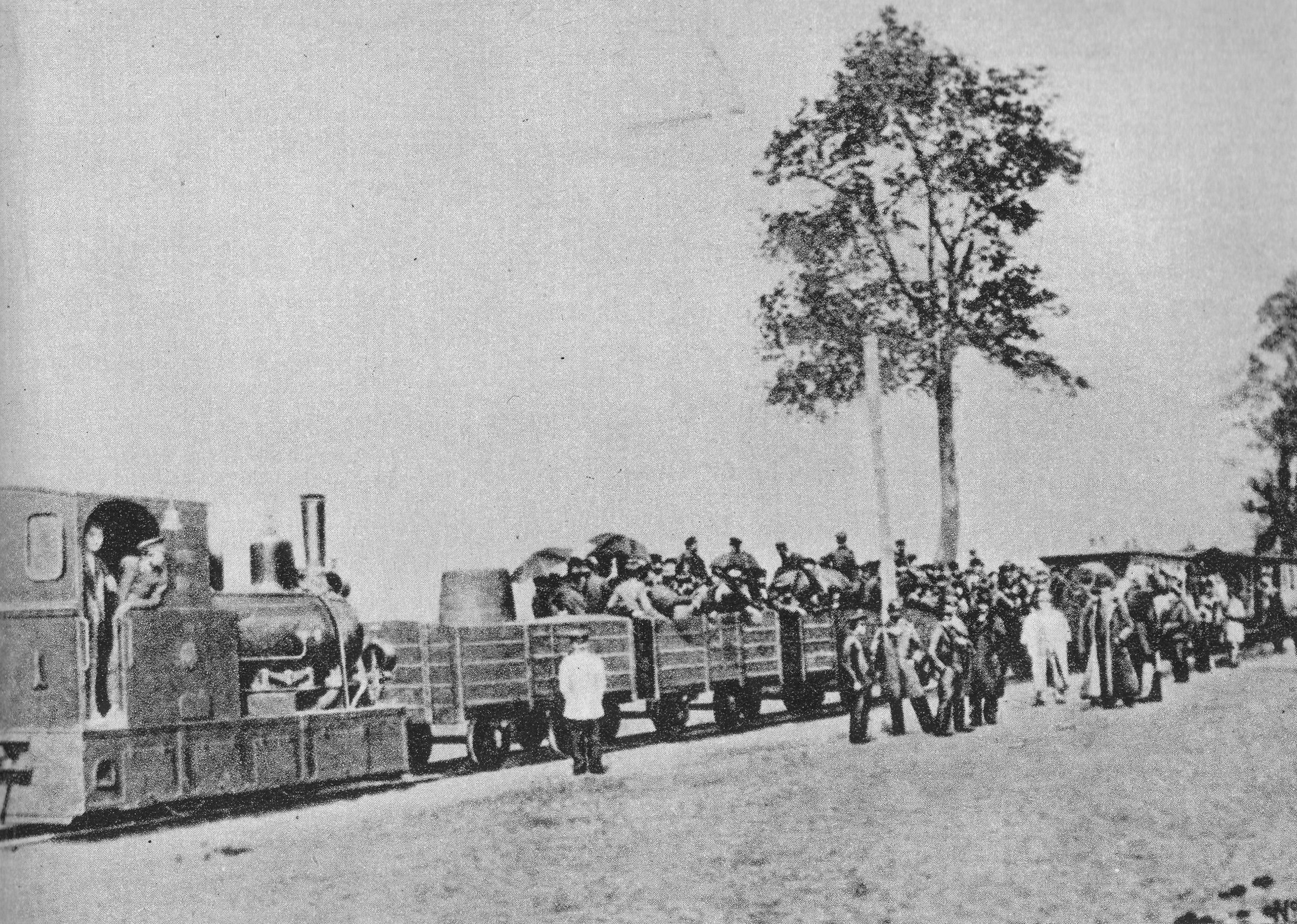 Pociąg kolejki grójeckiej przy trakcie Nowoaleksandryjskim (obecnie ul. Puławska) w 1899